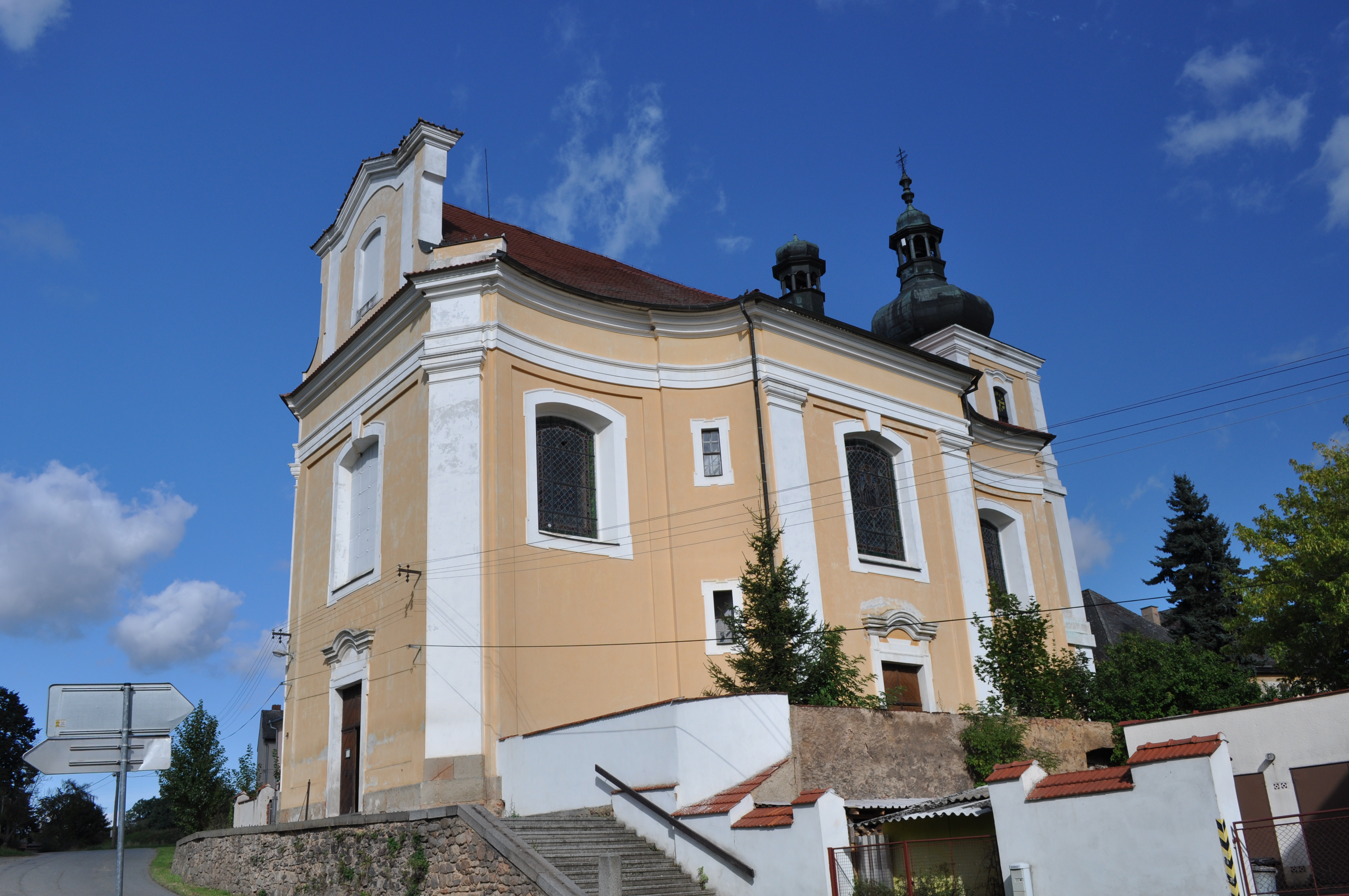 Kostel sv.Václava Žihle